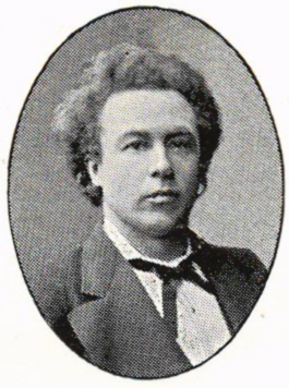 Skådespelaren Gustaf Adolf Gardt (1844-1902)